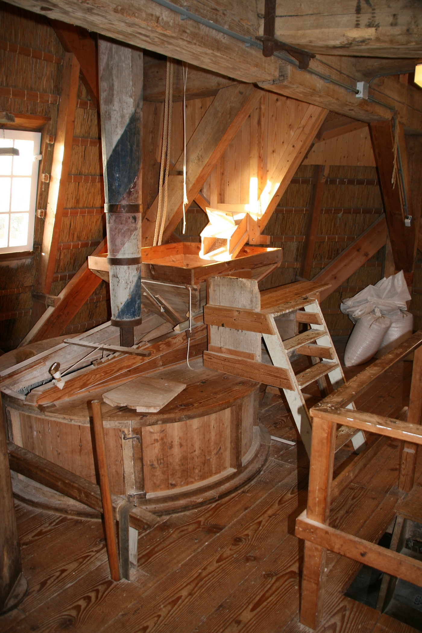 Ane: Anermolen - een van de twee maalstoelen, met prinsjeswerk op de steenspil